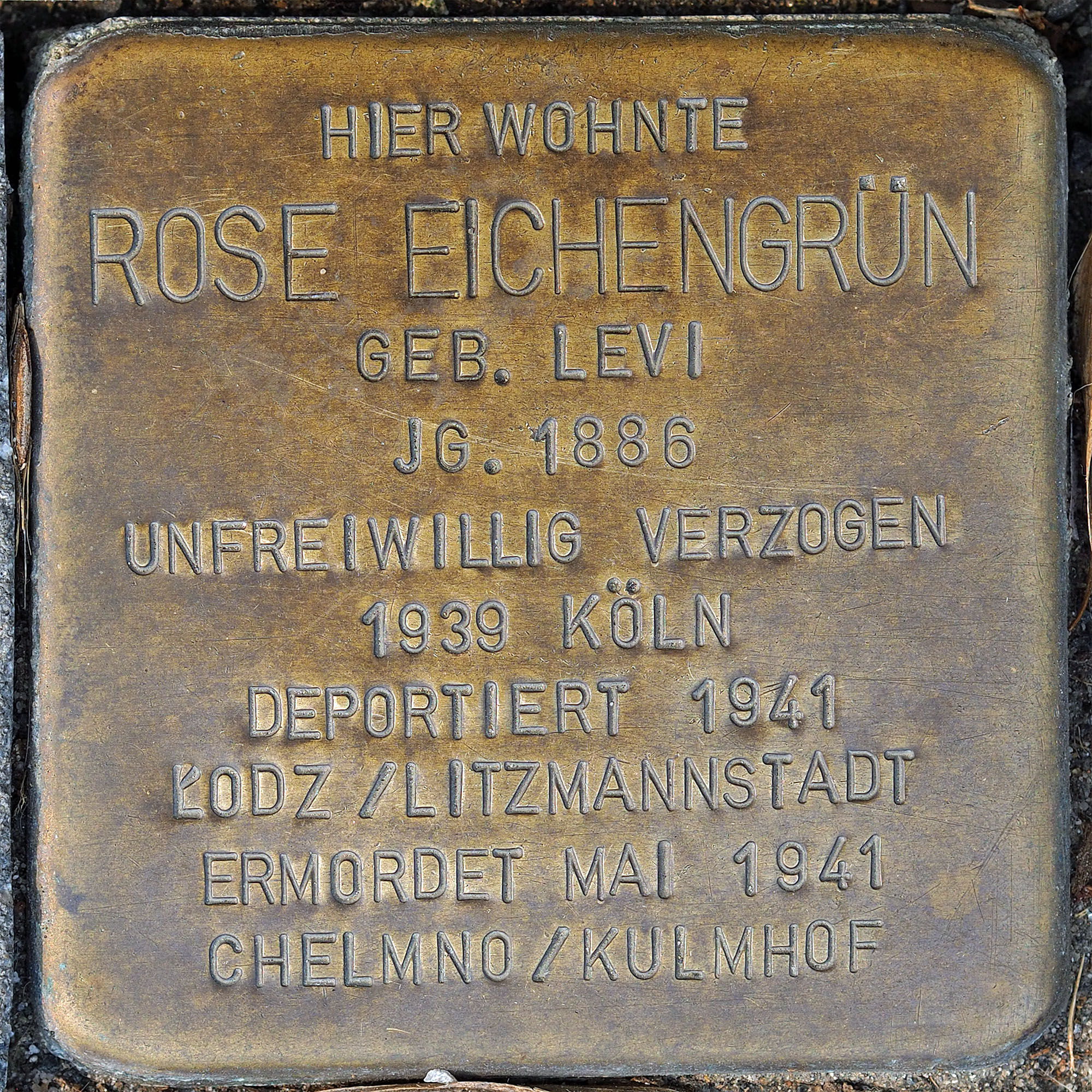 Stolpersteine GV: Eichengrün, Rosa